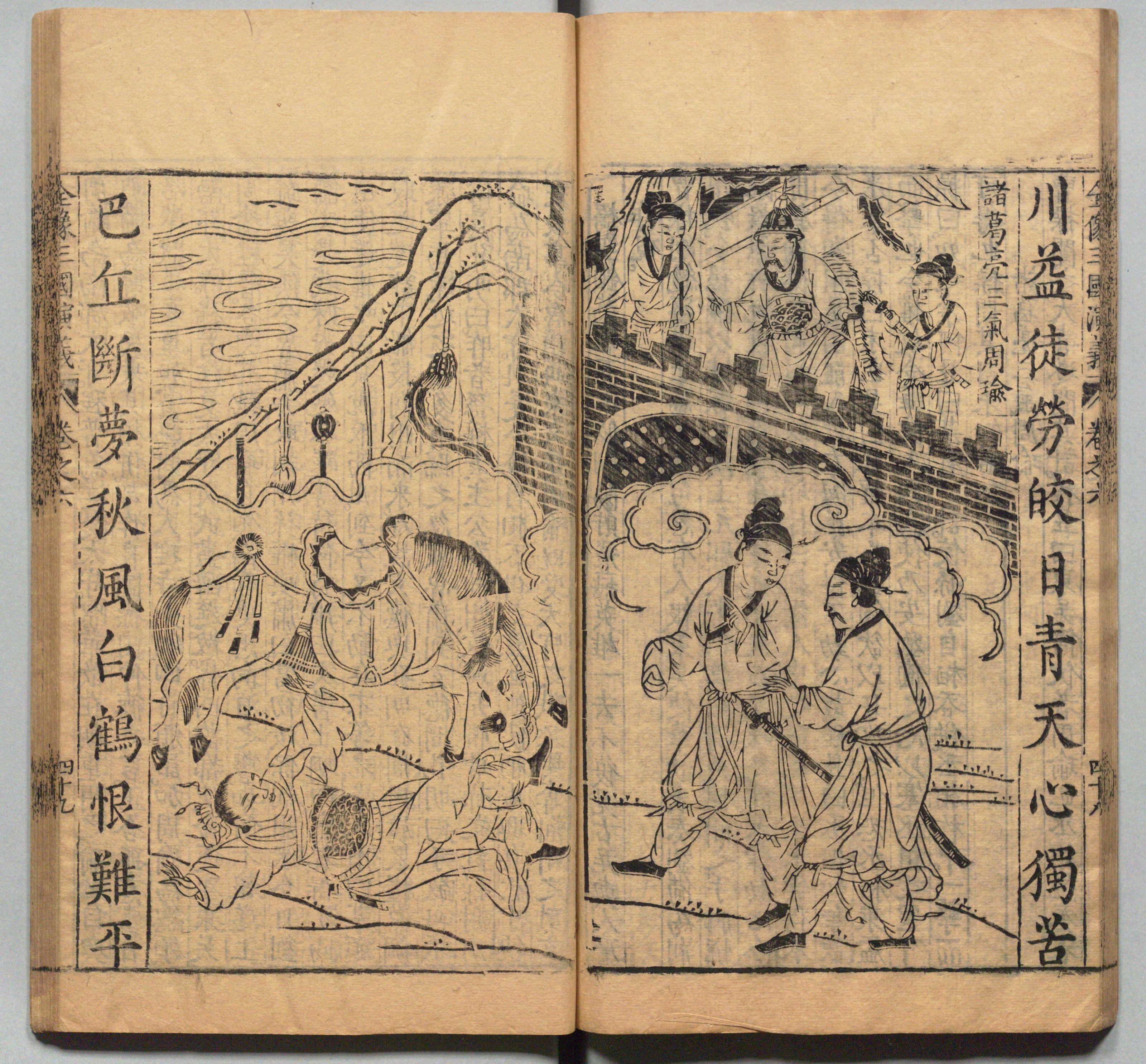 新刊校正古本大字音释三国志通俗演义 明万历十九年书林周曰校刊本